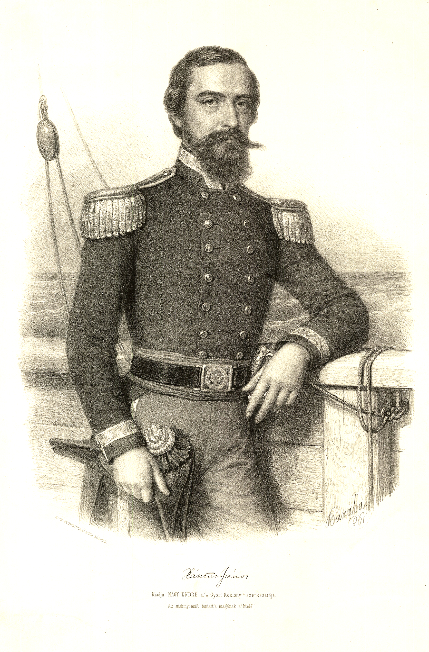 Csíktaploczai Xántus János, az Amerikai Egyesült Államokban ismert nevén John Xantus de Vesey (Csokonya, 1825. október 5. – Budapest, 1894. december 13.) magyar természettudós, utazó, néprajzkutató, a Magyar Tudományos Akadémia levelező tagja. Növény- és állattani kollekciójával jelentősen gazdagította a Magyar Nemzeti Múzeum gyűjteményét, ő volt a pesti Állatkert és a Magyar Nemzeti Múzeum Néprajzi Osztályának első igazgatója, négy kalandos útikönyv és több mint kétszáz ismeretterjesztő írás szerzője. /A kép érdekessége: amerikai tengerész egyenruhában ábrázolja Xantust, de valójában nem tengerész katona volt az amerikai hadseregben és amerikai polgárháborúban./